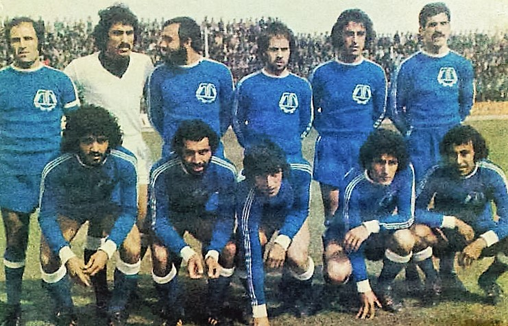 بازیکنان ماشین سازی تبریز در جام تخت جمشید 1355؛ ورزشگاه باغشمال.